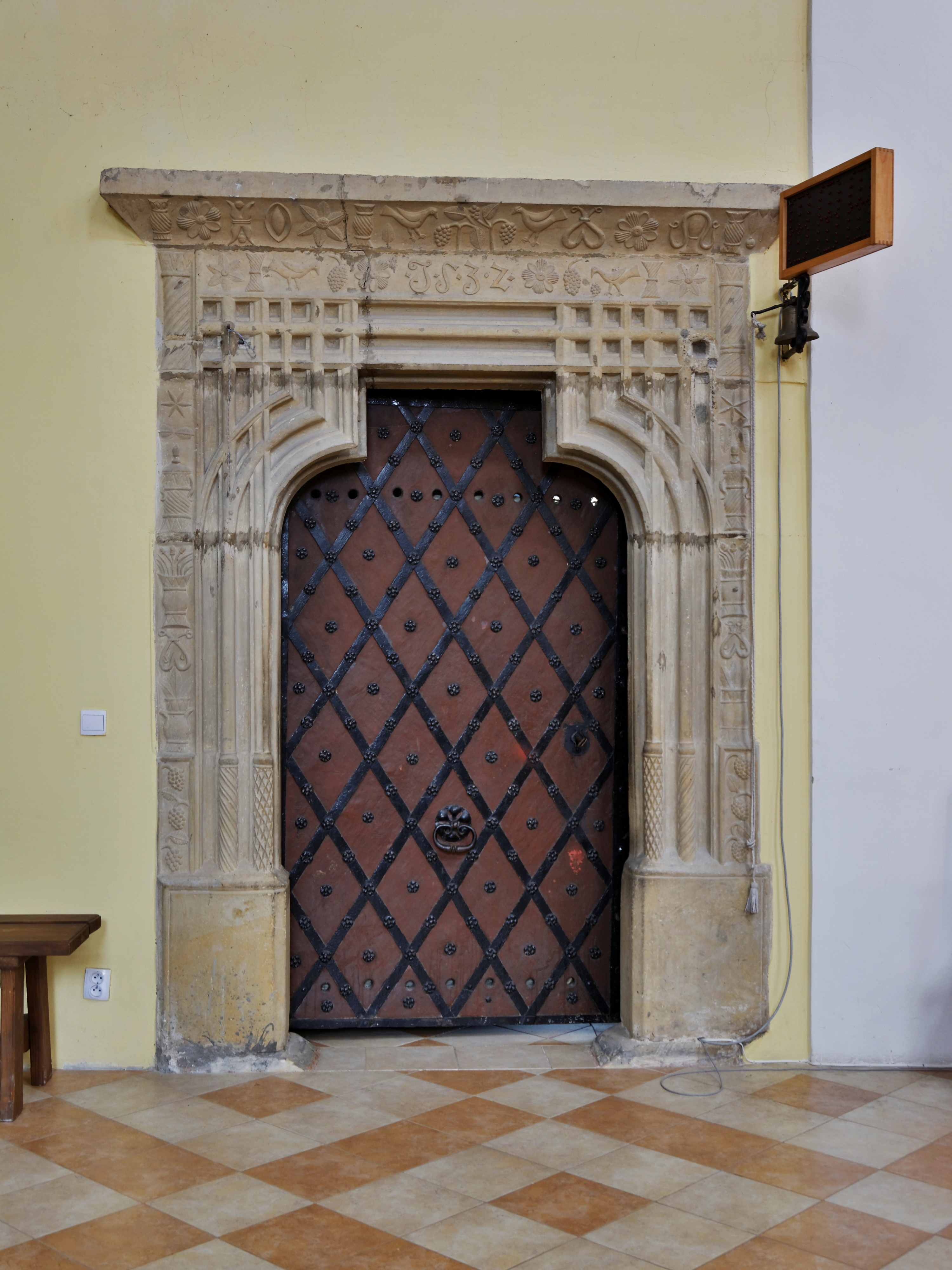 Kostel sv. Marka (Litovel), nám. Svobody, Litovel. Portál do sakristie z roku 1532.